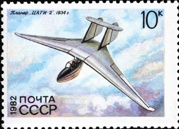 Почтовая марка СССР. ЦАГИ-2 (1934). Номер в каталоге ЦФА 5322